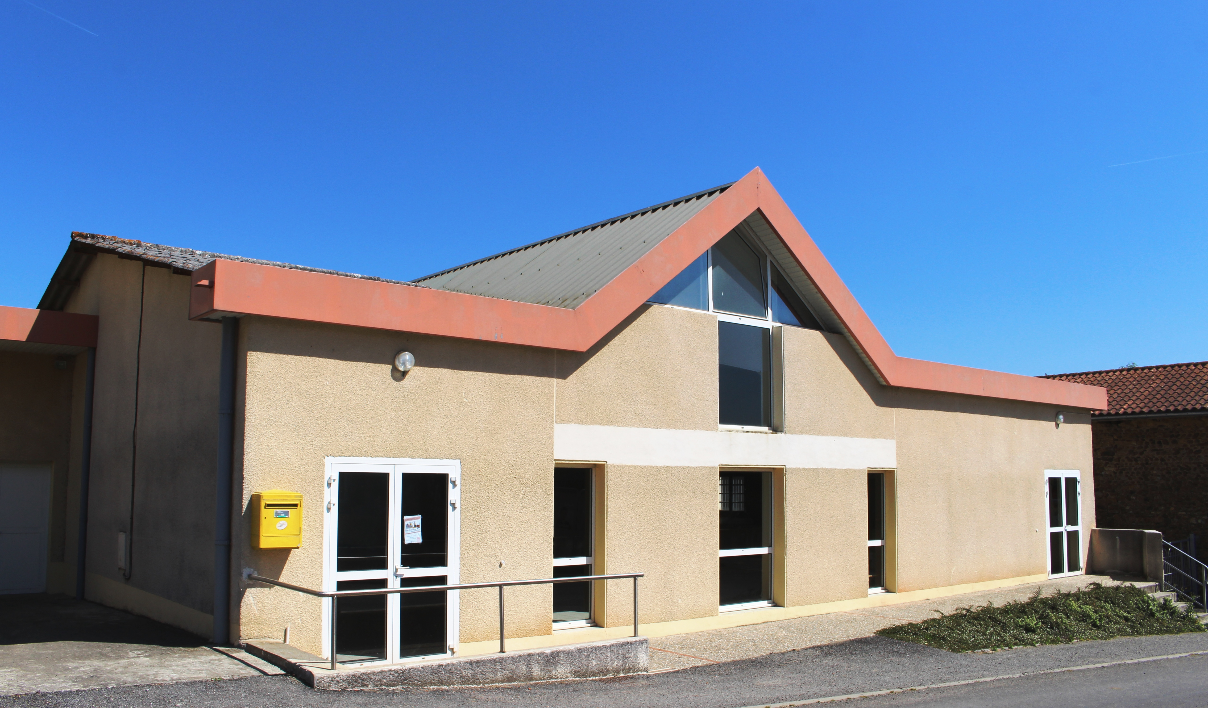 Salle des fêtes de Souyeaux (Hautes-Pyrénées)